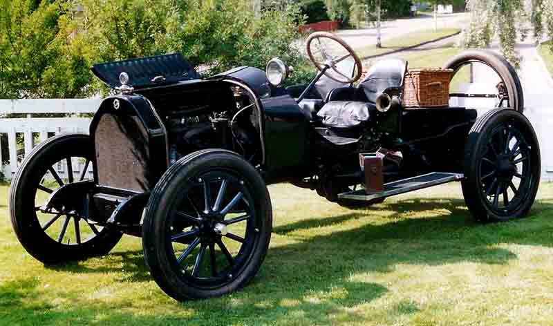 Studebaker Model SF Four-Forty Series 16/17 Speedster 1916